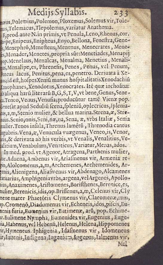 Anonymous & institutione grammaticae liber quintus [de Syllabarum quantitate ac versificandi ratione . Europeana. Retrieved on 2015-09-27.